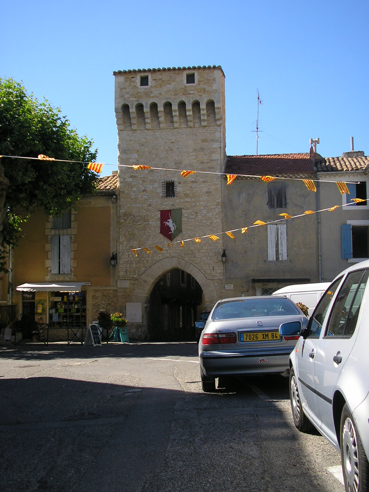 Mornas, le vieux village